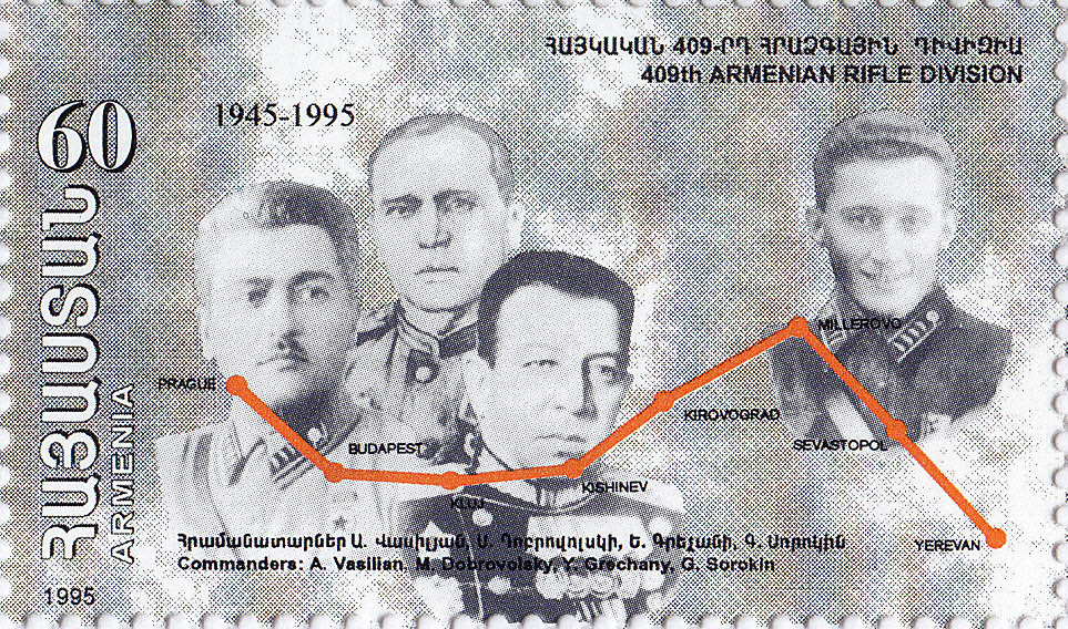 Командиры 409-й стрелковой дивизии А.А.Василян, М.И.Добровольский, Е.П.Гречаный и Г.С.Сорокин. Юбилейная марка Республики Армения.